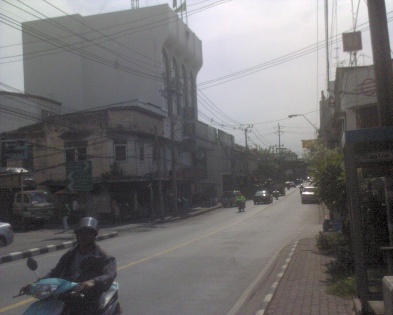 Talad Plu (ตลาดพลู กรุงเทพ)